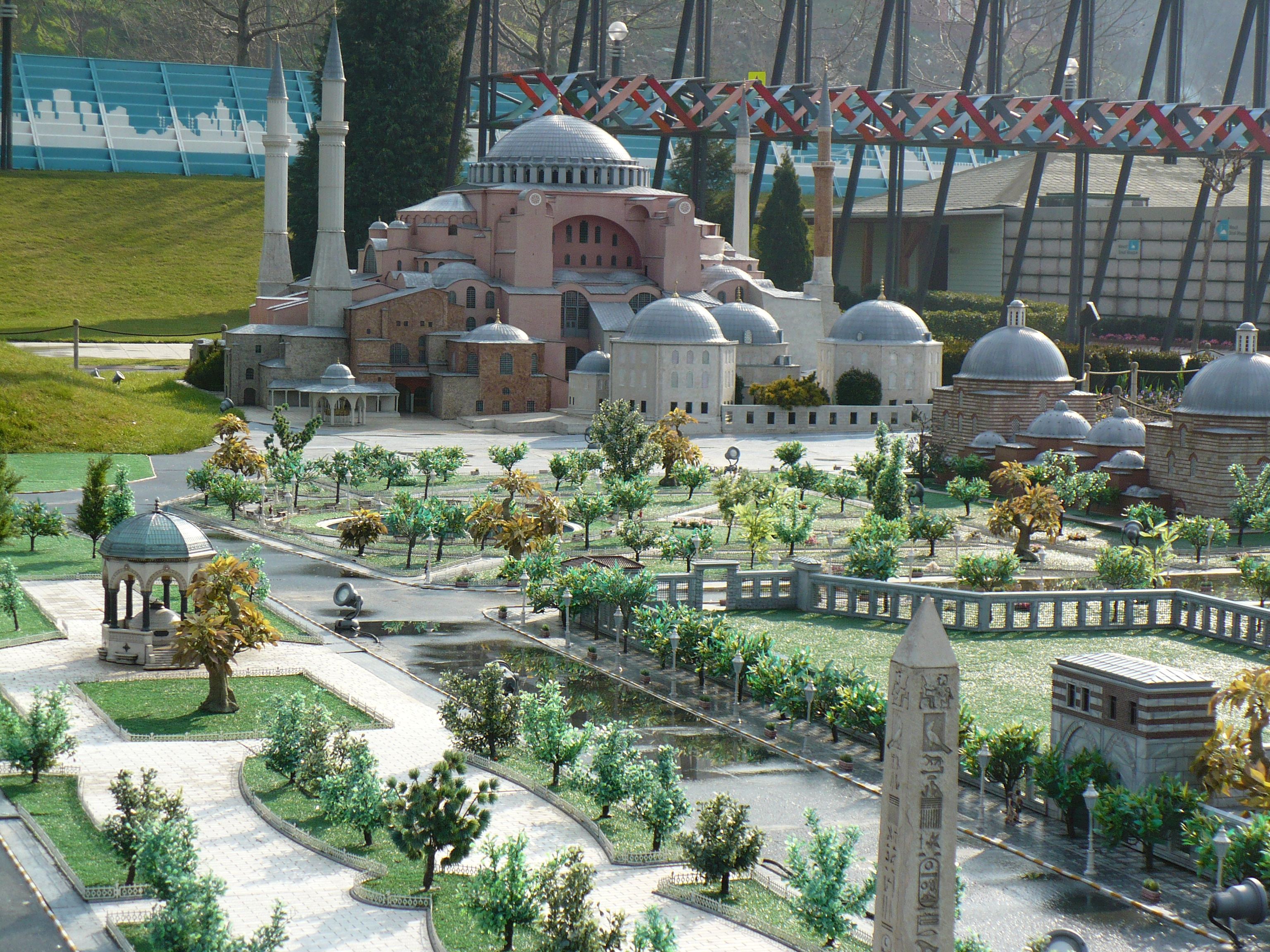 Miniatürk İstanbul'dan görüntüler